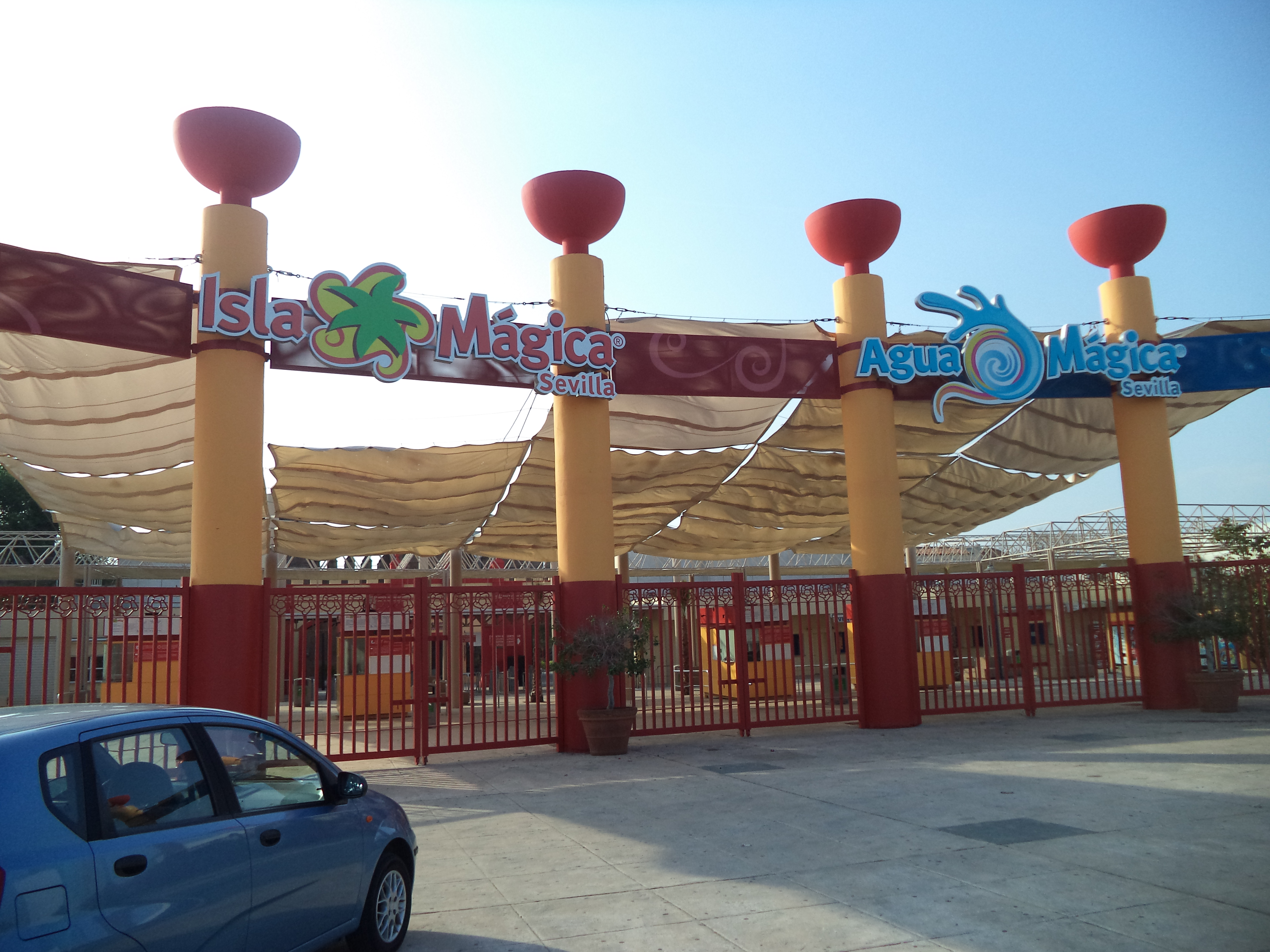 La entrada a Isla Mágica en 2014